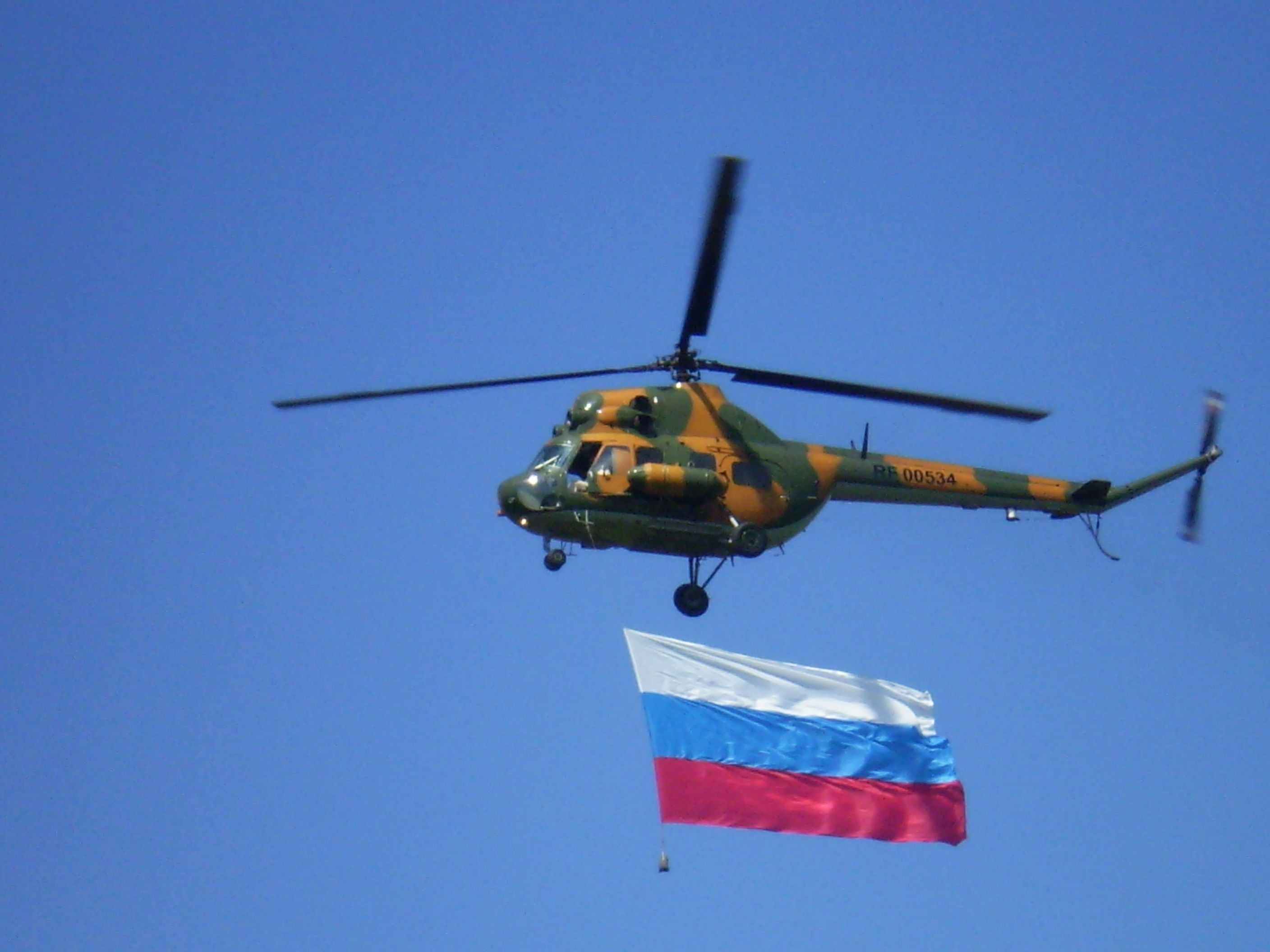 Многофункциональный вертолёт Ми-2 с флагом РФ делает облёт над аэропортом Толмачёво (Новосибирск) во время празднования 55-летия 14-й армии ВВС и ПВО